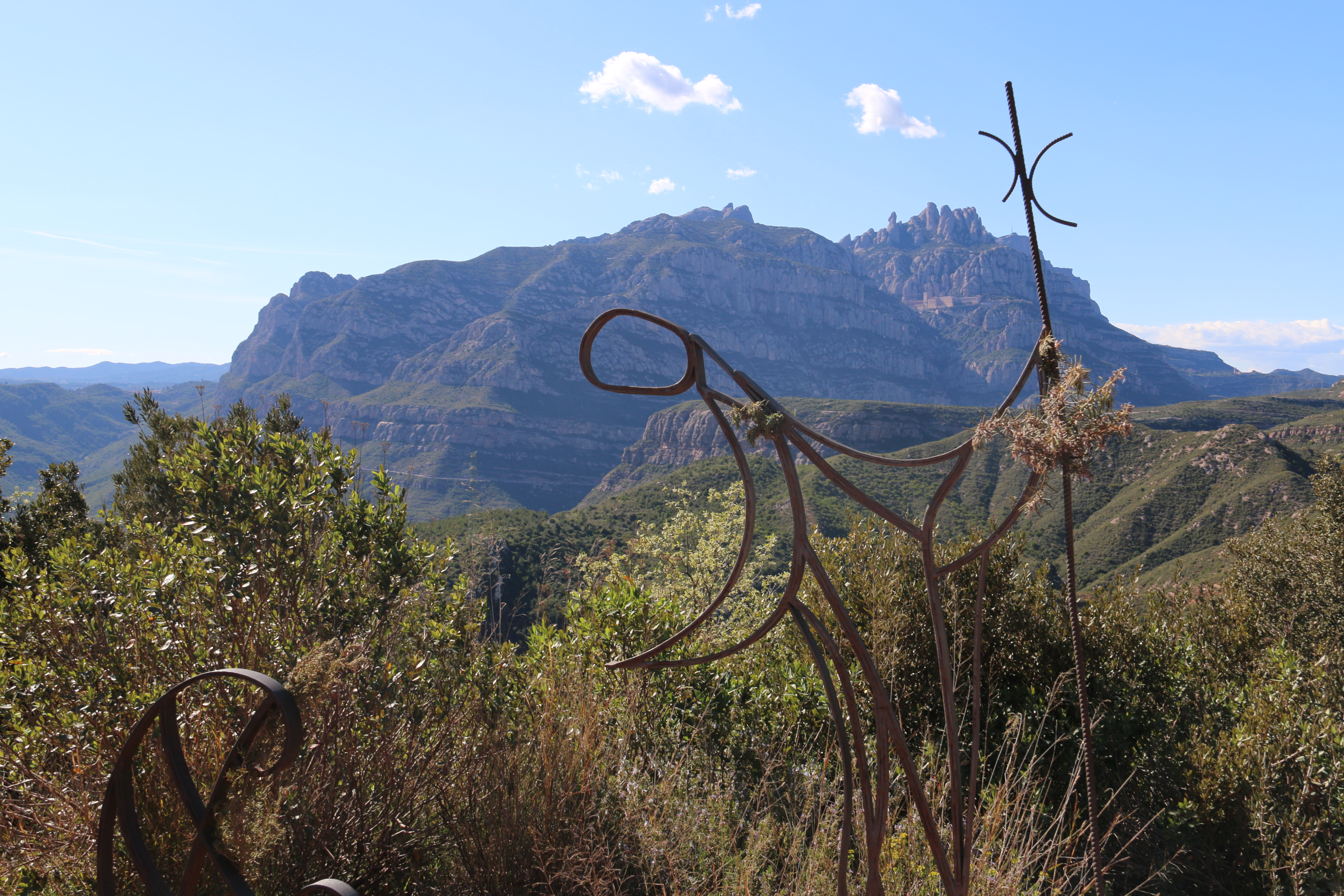 Vista a Montserrat amb el passebre de ferro